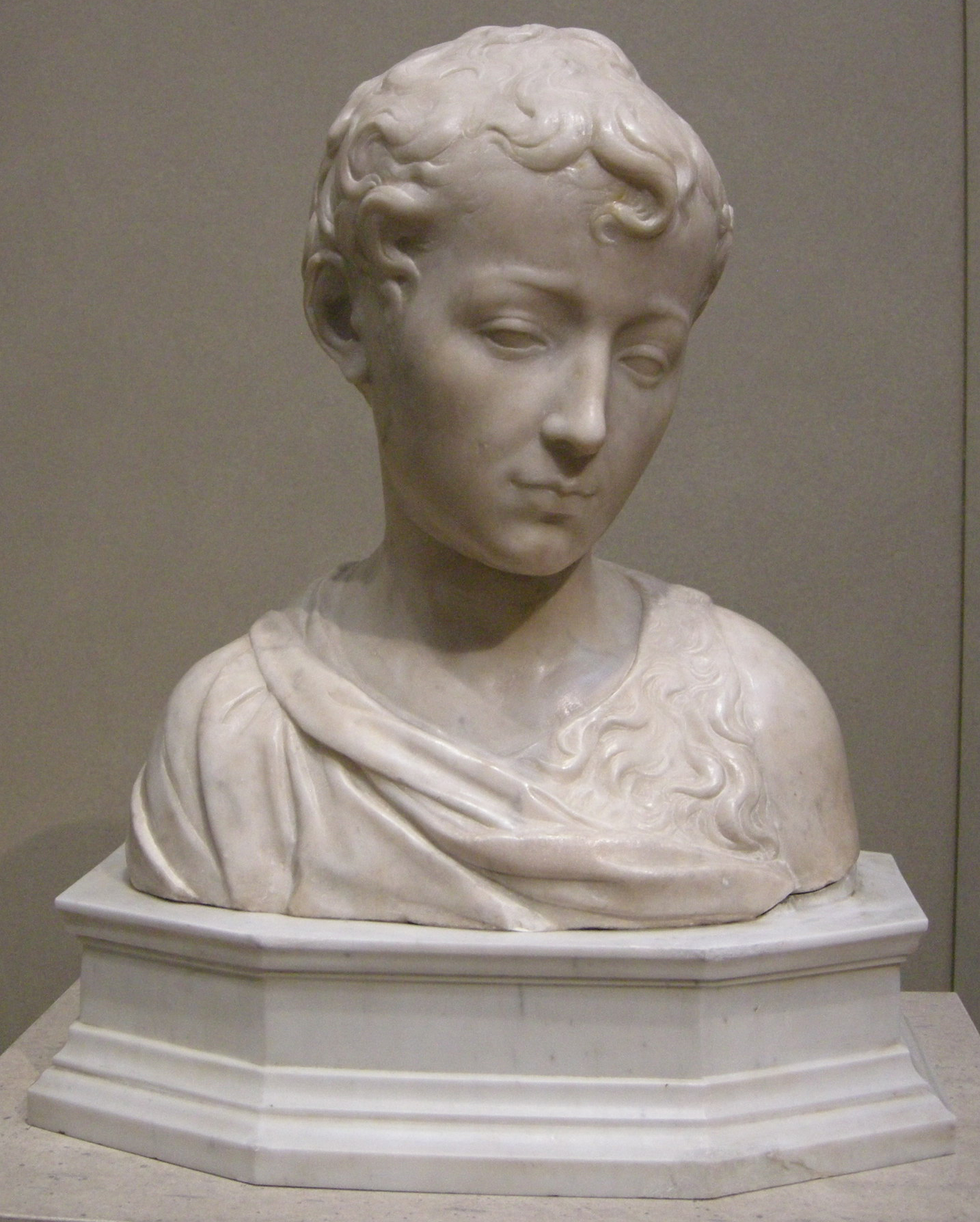 Antonio rossellino, giovanni battista fanciullo, 1470 circa